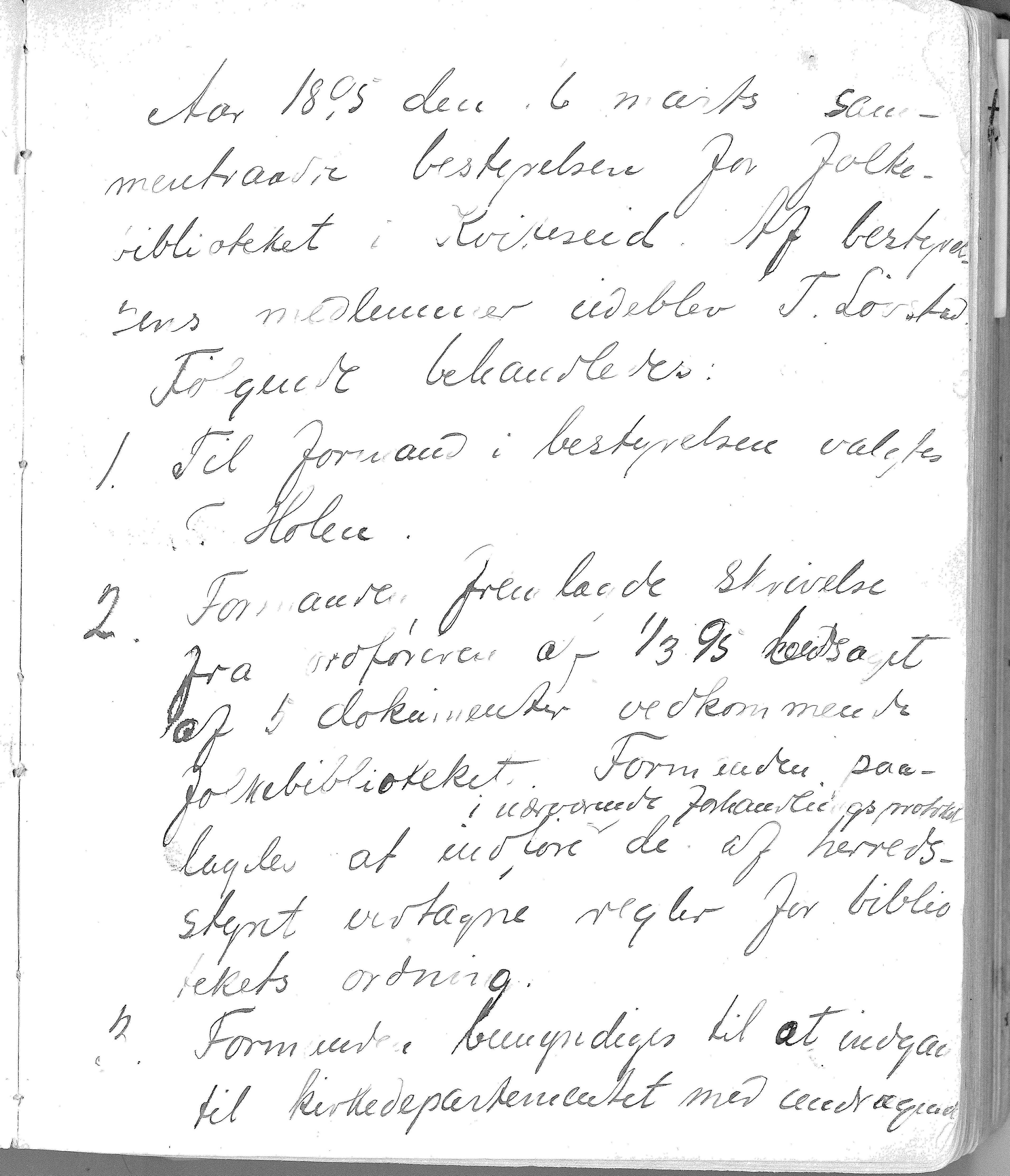 Protokoll for Kviteseid Folkeboksamling